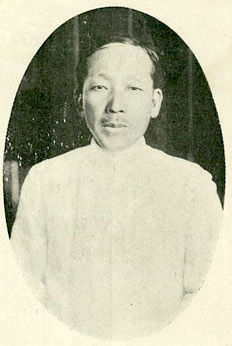 Bân-lâm-gú: 水越幸一 Mizukoshi Kōichi